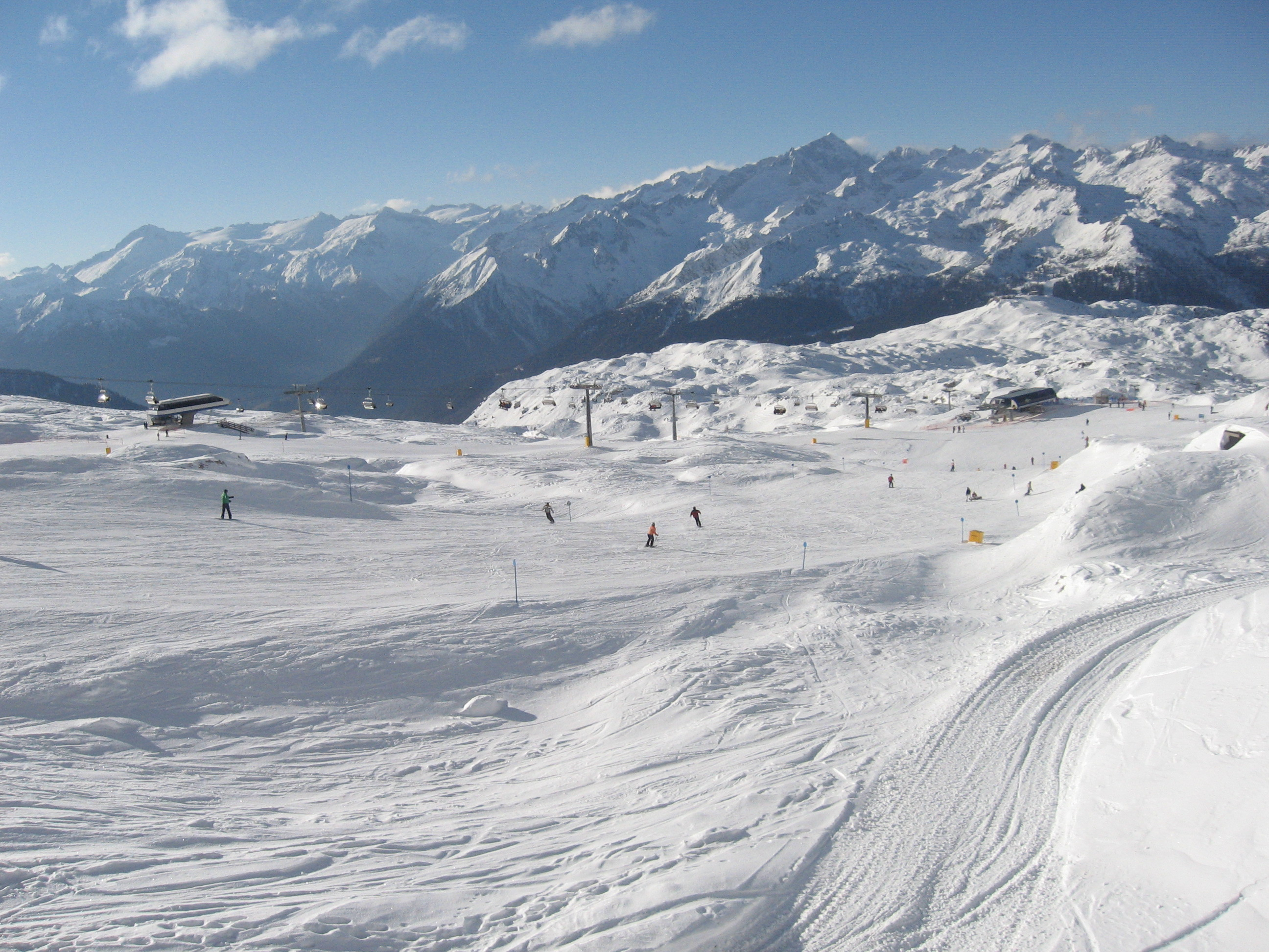 מסלולים מושלגים באתר הסקי מדונה די קמפיליו